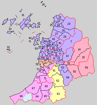 後の愛媛県温泉郡・伊予郡域の町村制時点の町村。